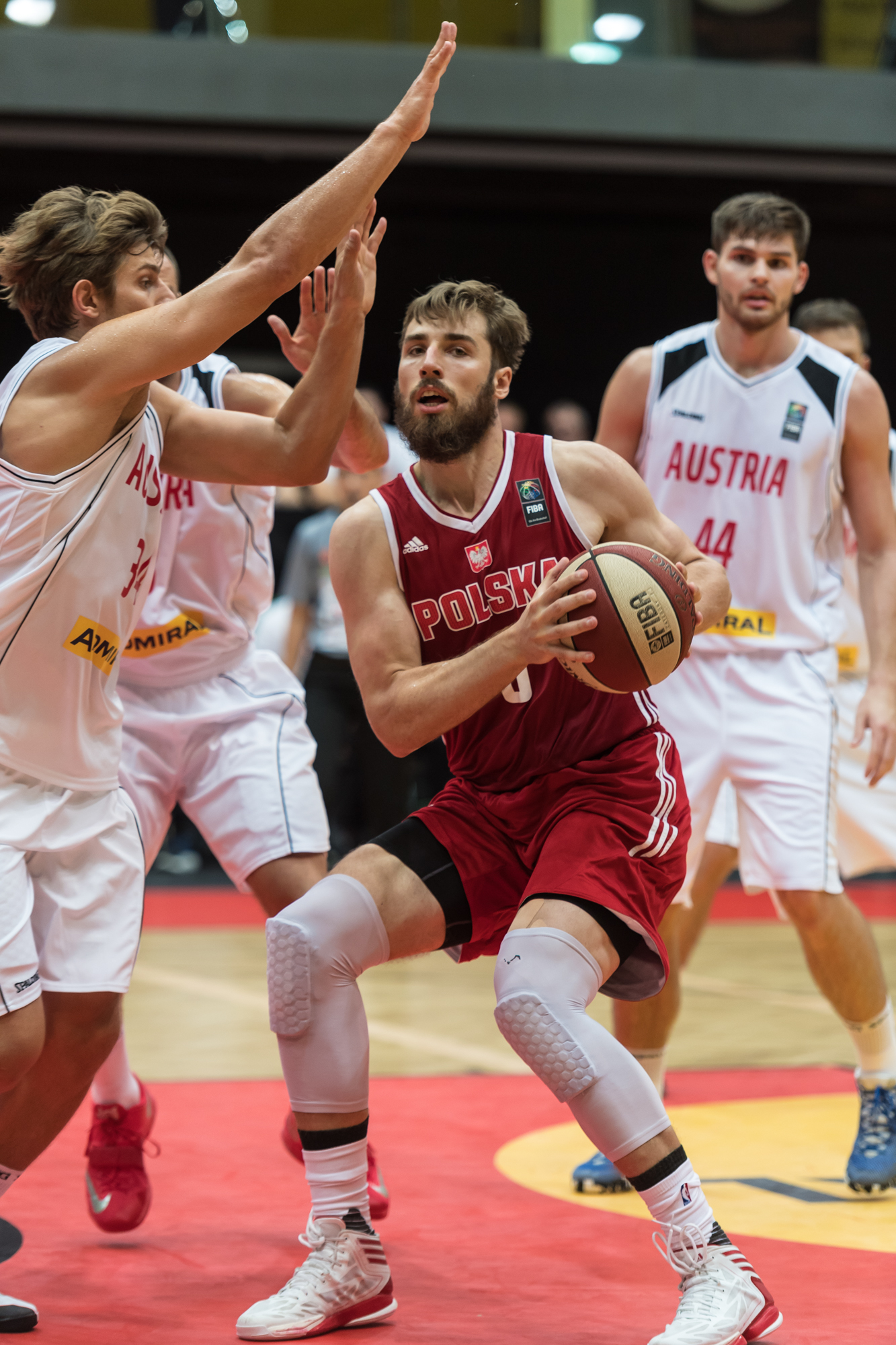 ÖBV Vier-Nationen-Turnier vom 12.-14. August 2016 in Schwechat - Österreich vs Polen. Bild zeigt Moritz Lanegger (AUT) und Aleksander Czyz (POL)